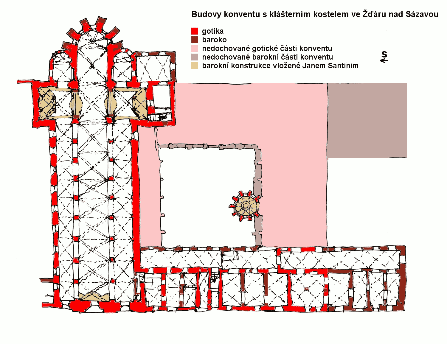 Půdorys budov konventu i přilehlým klášterním kostelem ve Žďáru nad Sázavou